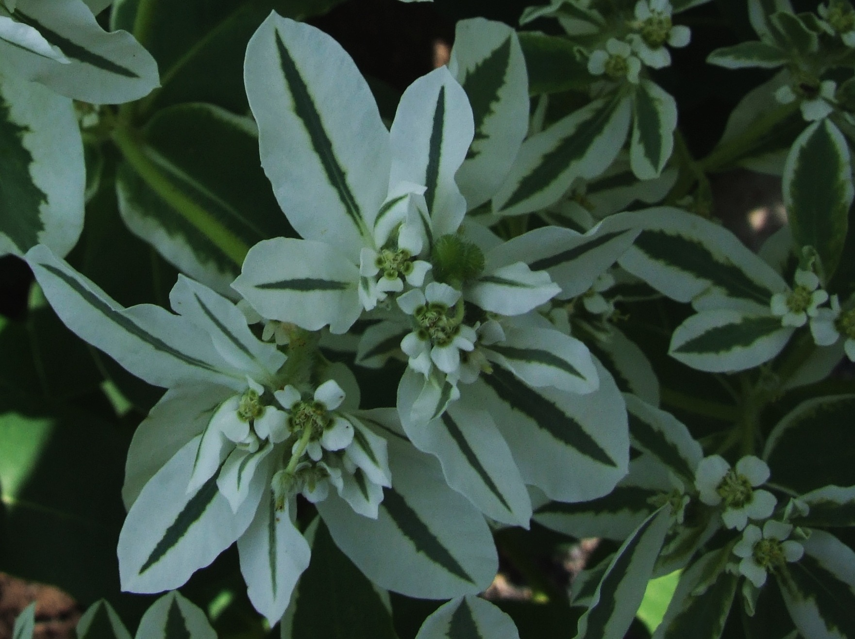 Euphorbia_marginata (pl. wilczomlecz obrzeżony)